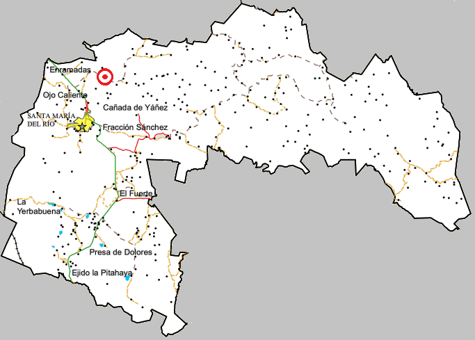 Ubicación de la comunidad de Bernalejo en el municipio de Santa Maria del Rio.